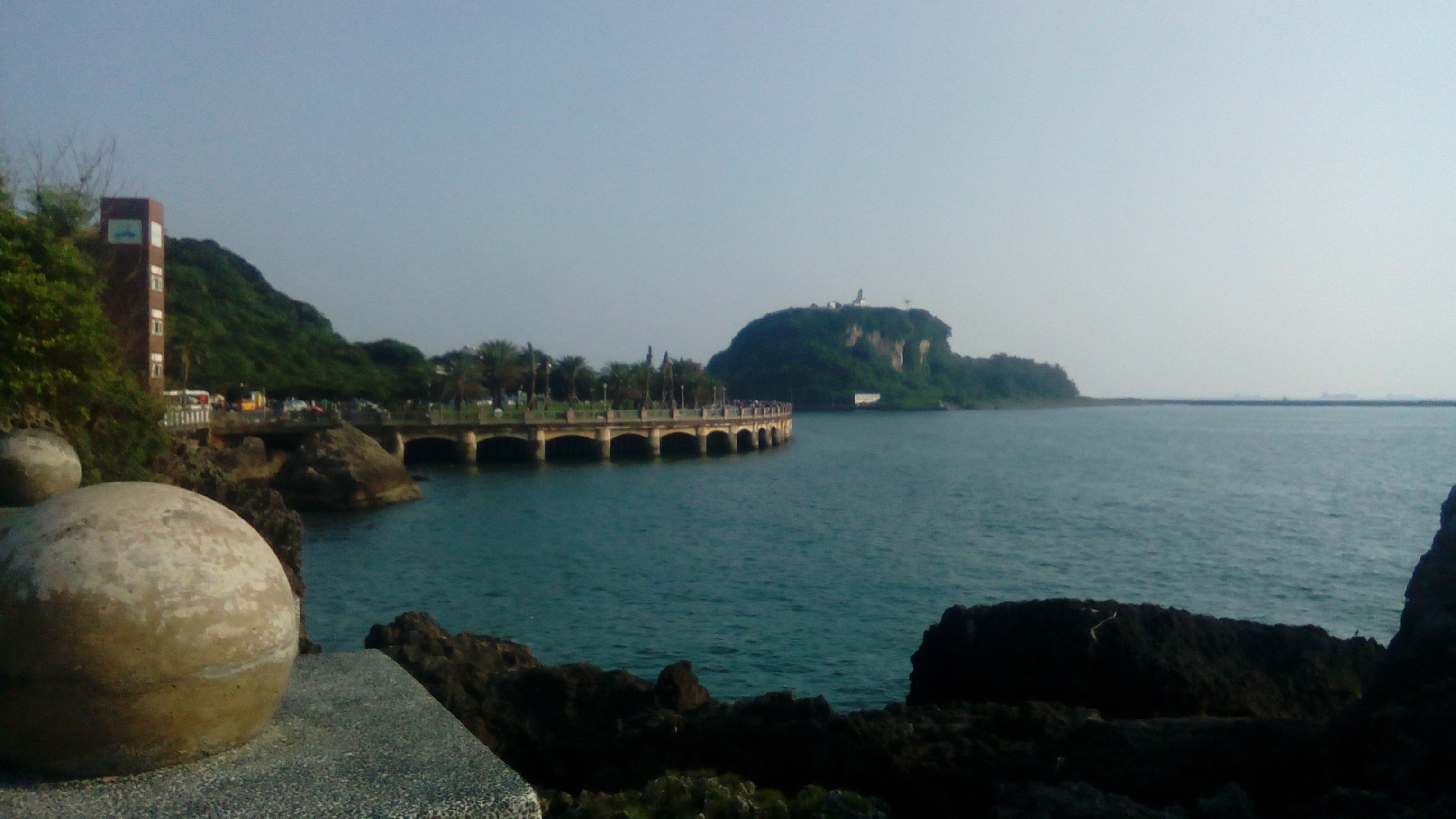 旗津最北點 旗后山及旗后砲台